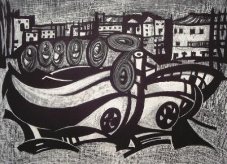 Teresa Sousa (1928-1962), "Barcos" (1958, gravura, litogravura, 308 x 425 mm)